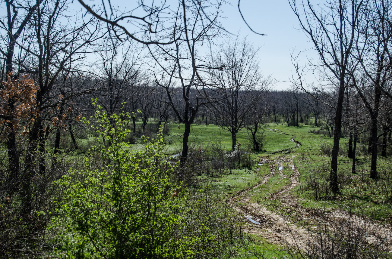 Dehesa de Valdellán. Detalle.